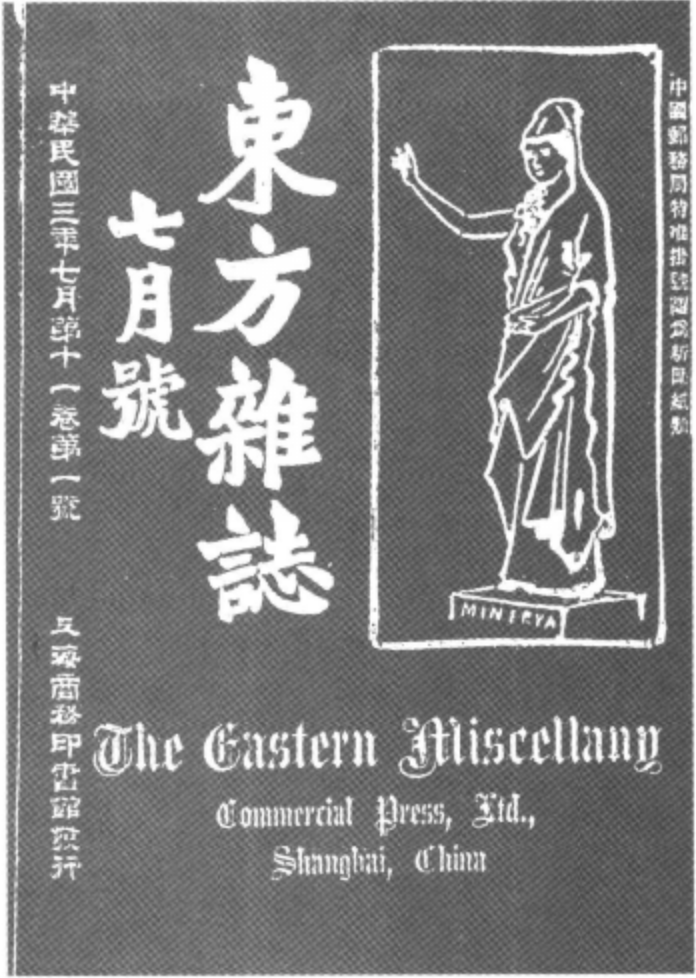 中文（中国大陆）: 上海商务印书馆《东方杂志》民国三年（1914年）第十一卷第一号